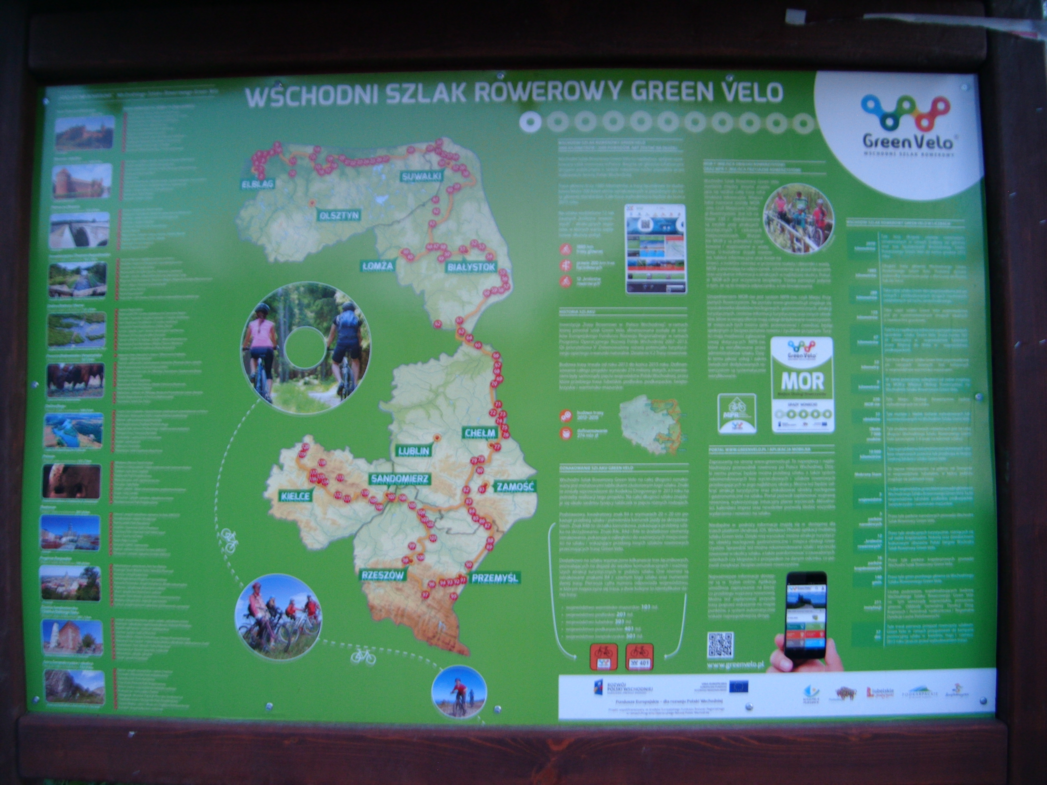 tablica informacyjna w miejscowości Krasice (woj. podkarpackie)